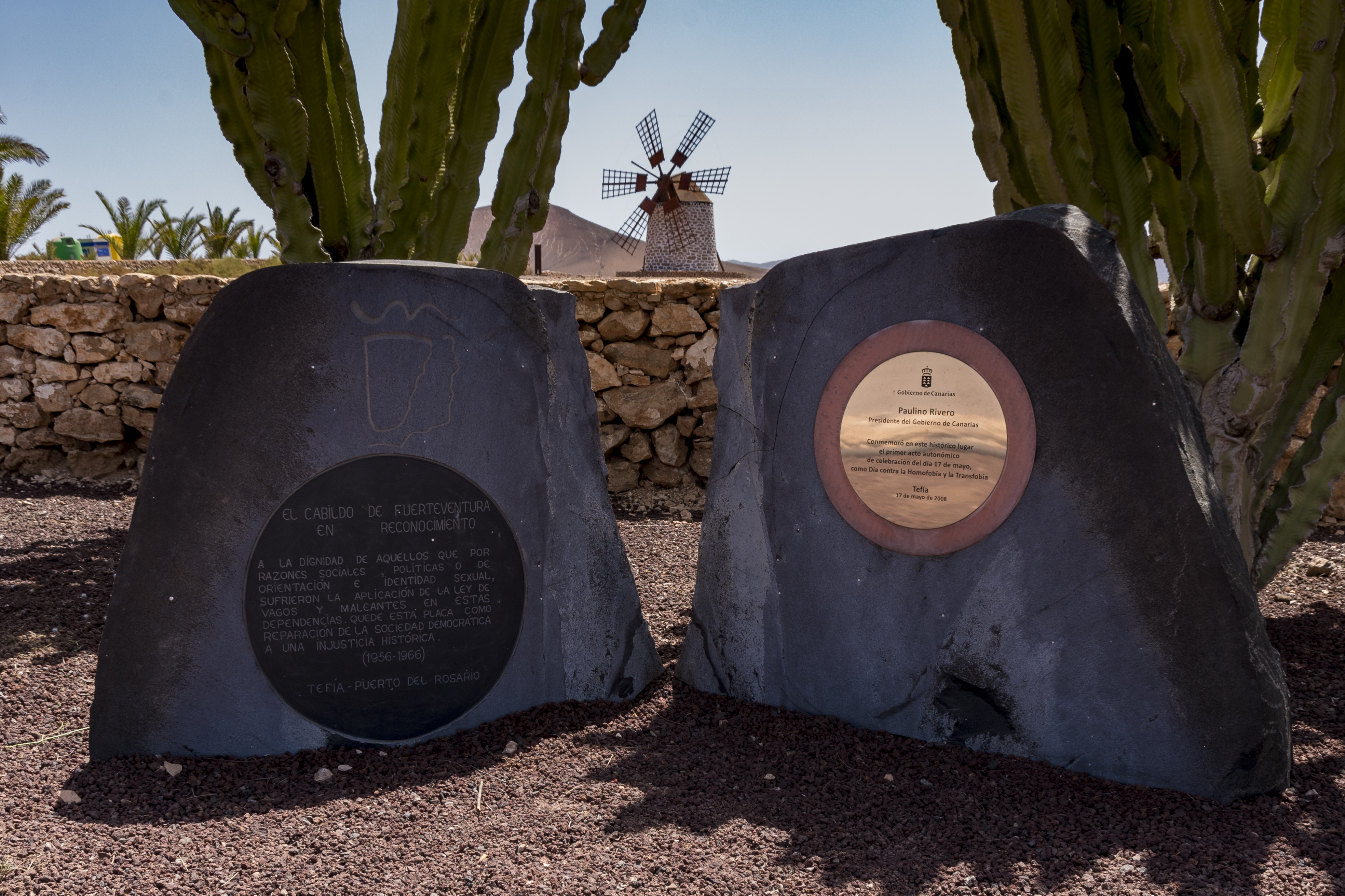 Albergue de Tefía (antigua Colonia Agrícola Penitenciaria de Tefía)